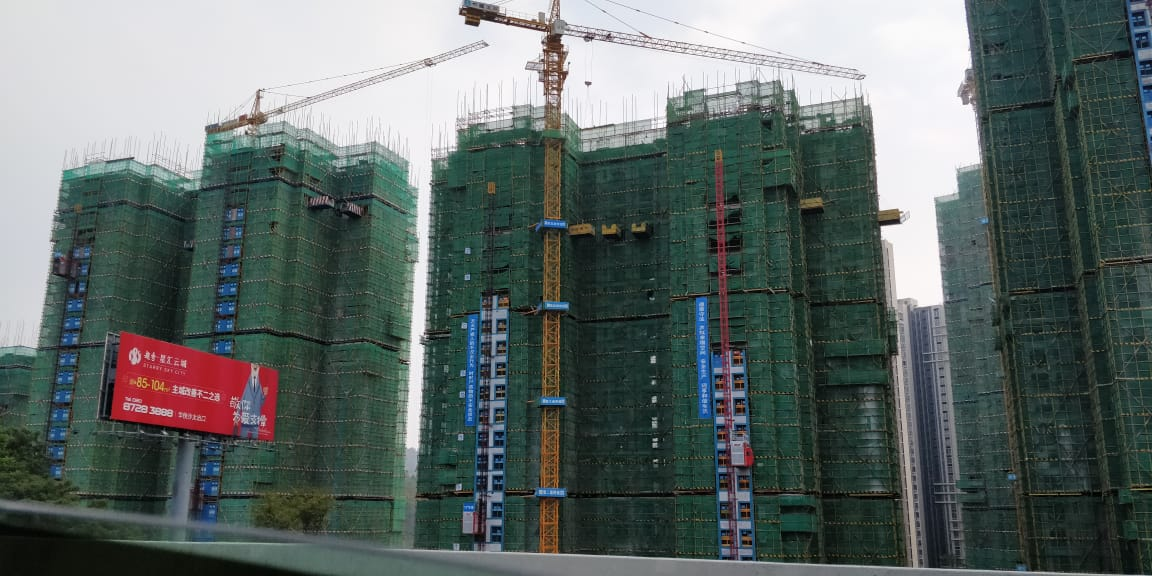 Застройка новый жилых кварталов в Гуанчжоу